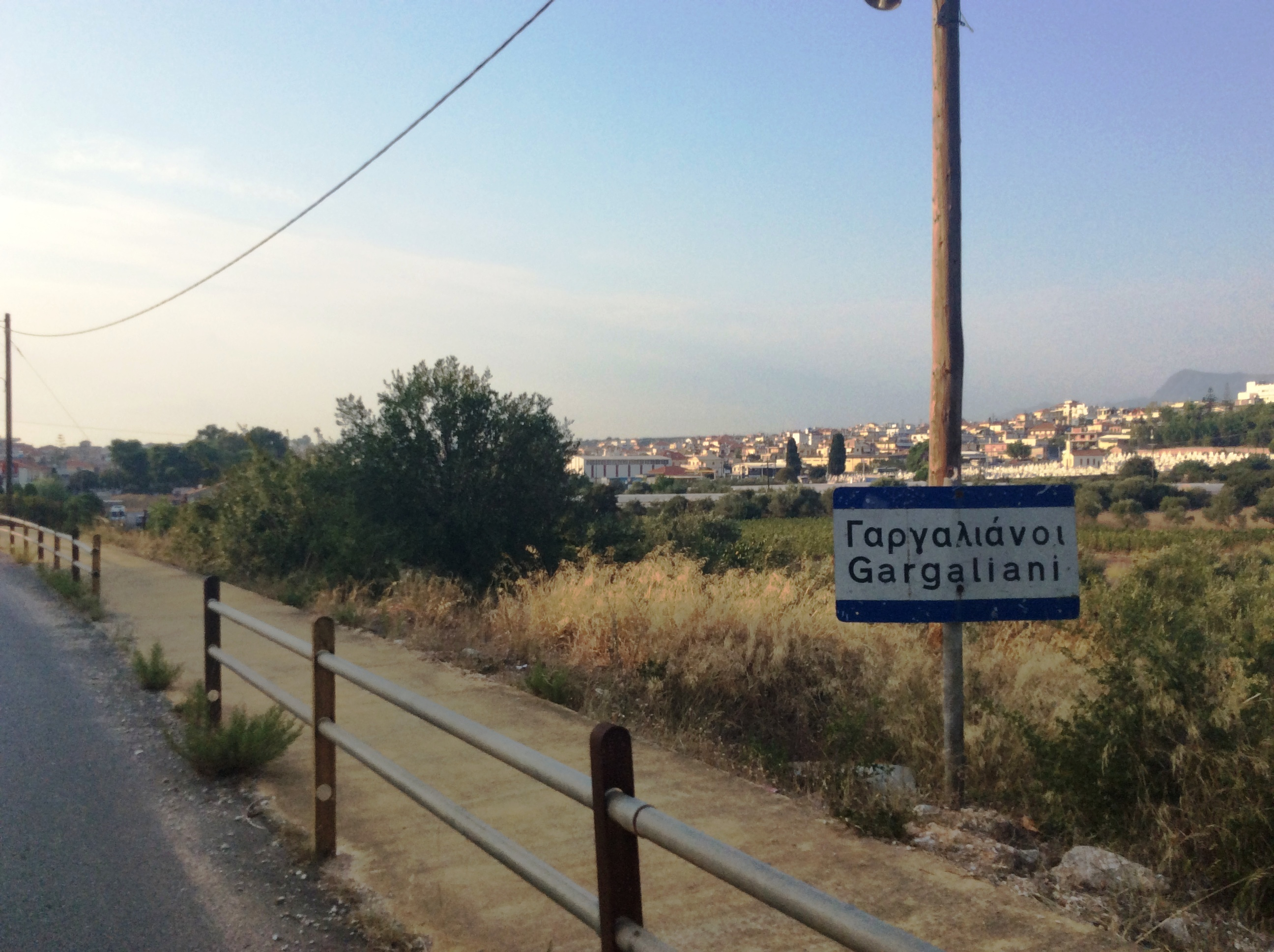 Γαργαλιάνοι Μεσσηνίας. Η νοτιοανατολική κεντρική είσοδος στους Γαργαλιάνους.